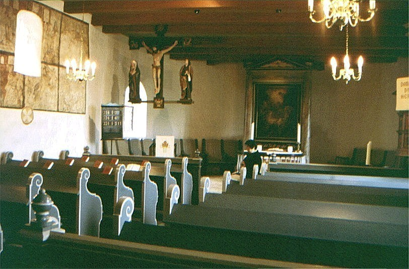 Loit Kirke i Sydslesvig. Skib mod øst